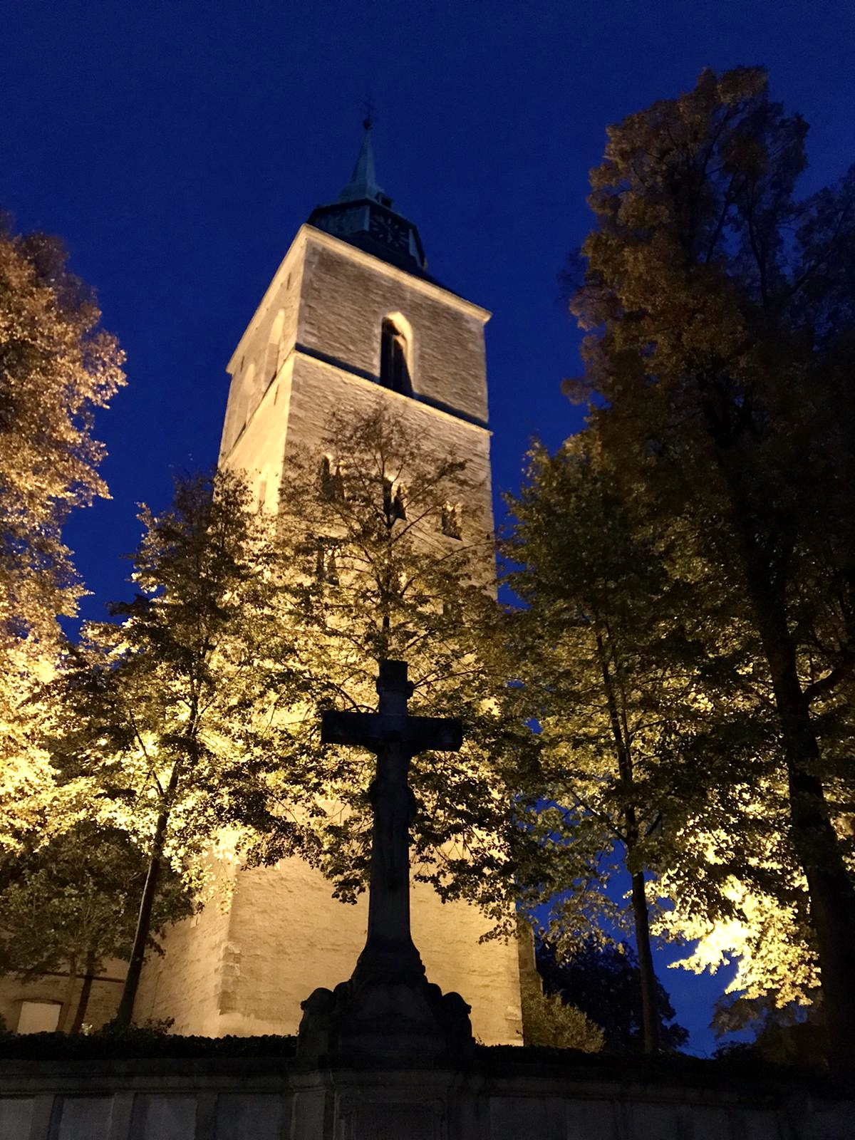 Martinuskirche in Greven, Westfalen, bei Nacht